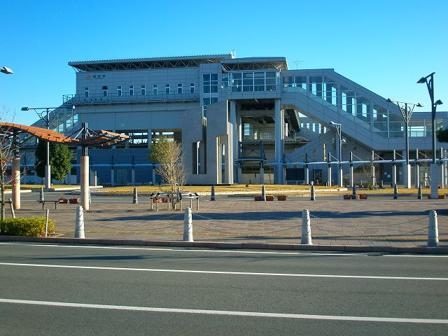 愛野駅